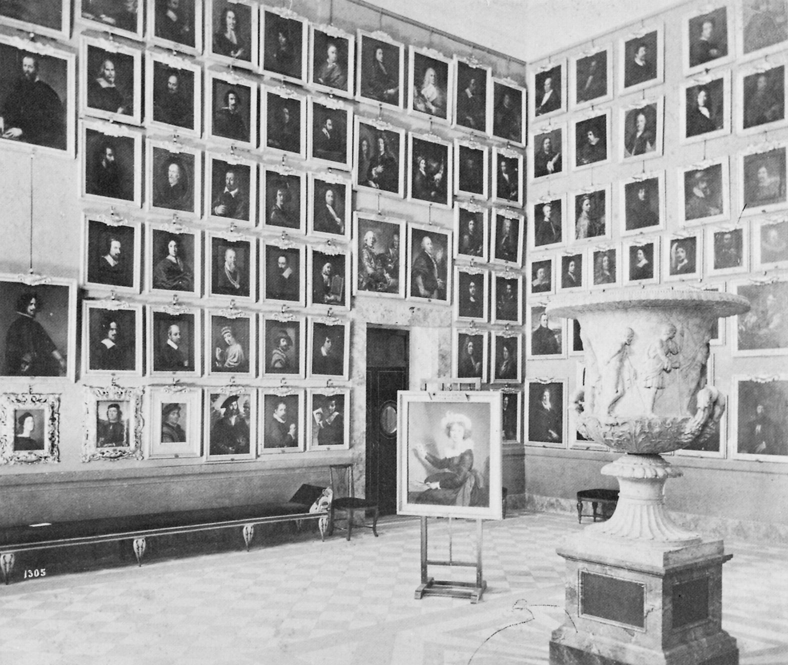 Gebrüder Alinari: Saal der Malerporträts in Uffizi